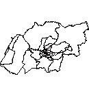 mapa del distrito de jose luis bustamante y ribero, Arequipa